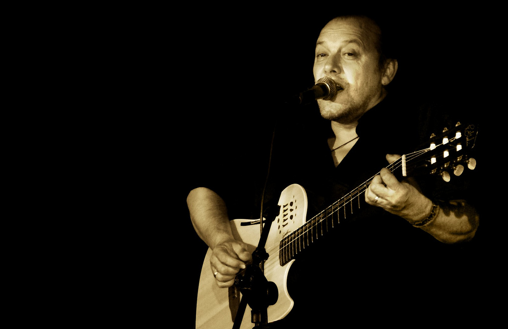 nesa galija